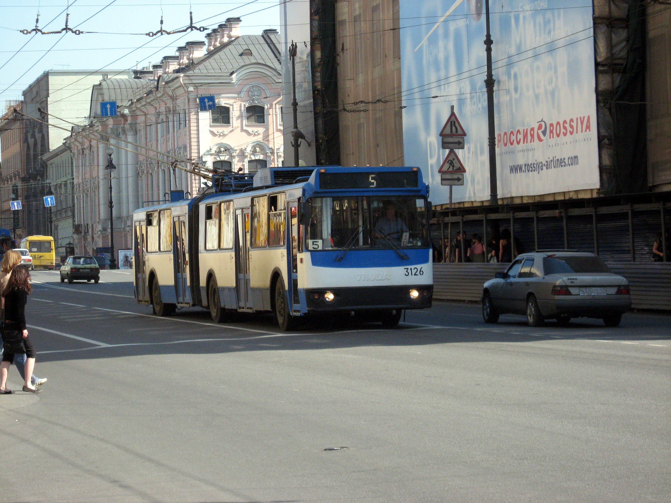 Sankt-Petěrburg (Petrohrad), trolejbus